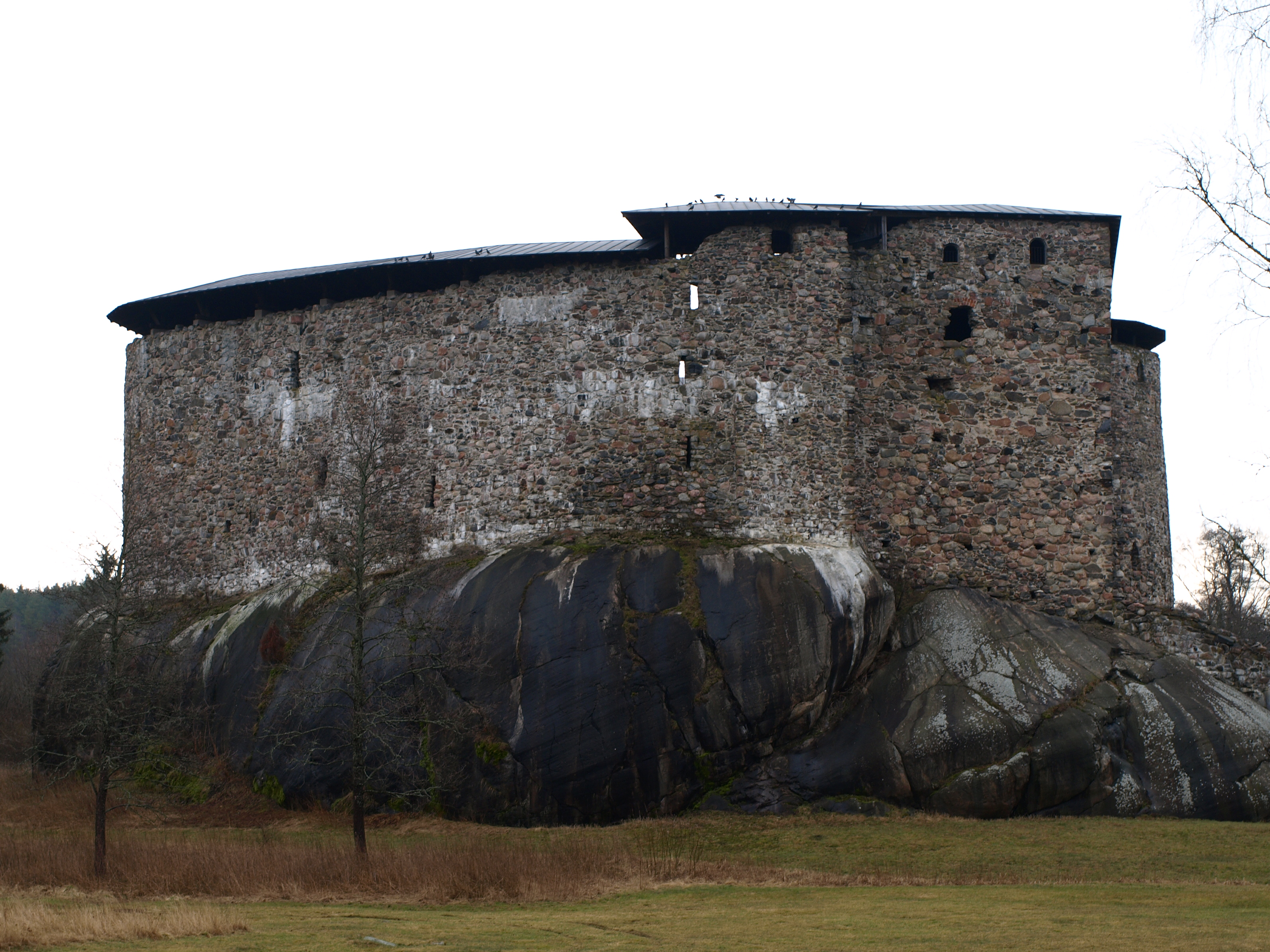 Die Burgruine Raseborg bei Snappertuna (Südfinnland)